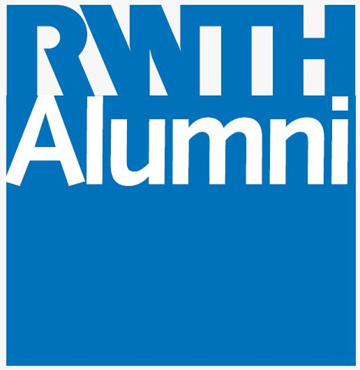 Logo Alumni der RWTH Aachen